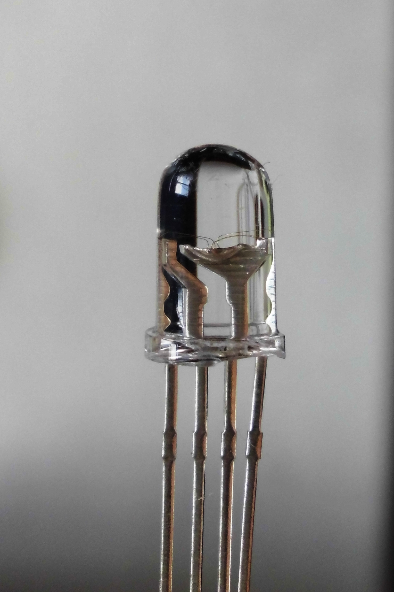 RGB-светодиод четырёхконтактный. 1 вывод (второй справа) - катод ("-"), остальные 3 вывода - аноды ("-") светодиодных чипов полупроводниковых переходов (красного, синего, зелёного свечения). Питание током постоянного напряжения 3 В.